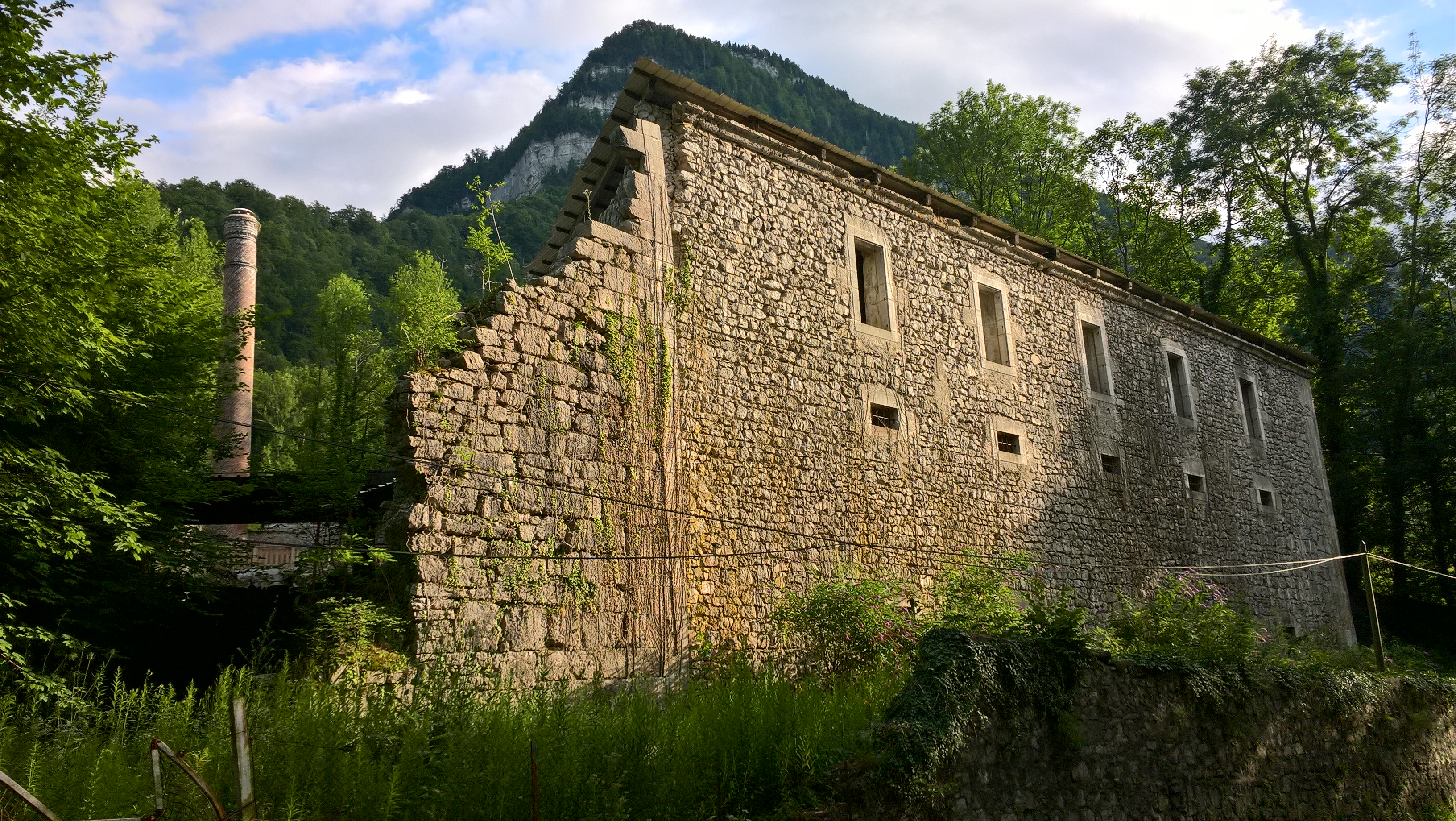 Saint-Laurent-du-Pont, ruines de la distillerie des Chartreux de Fourvoirie détruite par un glissement de terrain en 1935. .